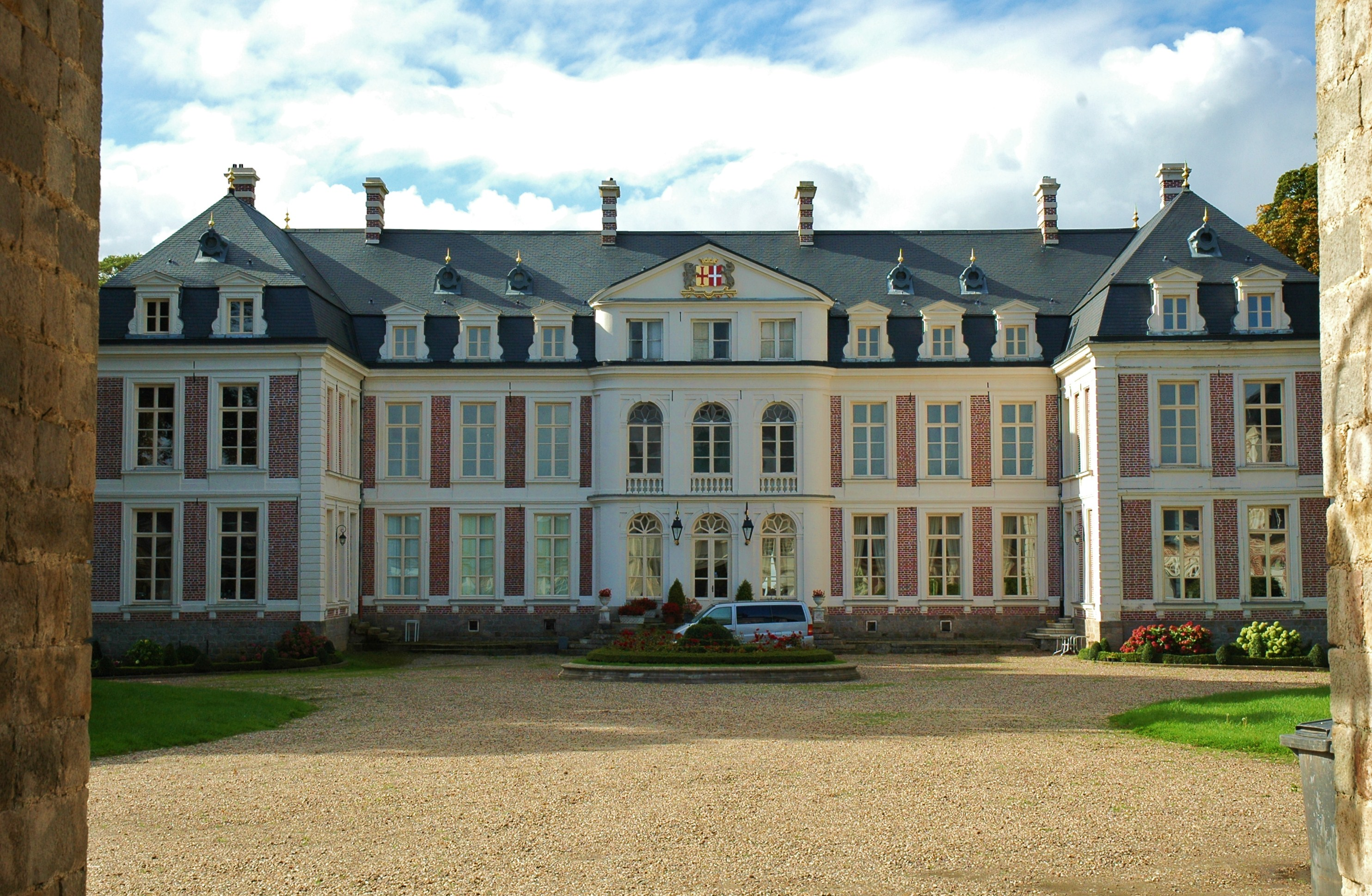 Le château de Flers, Pas-de-Calais, France